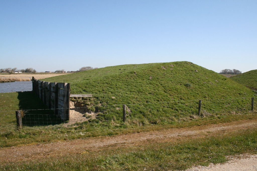 Stackdeich (Deichbaumuseum Neukirchen / Nordfriesland)